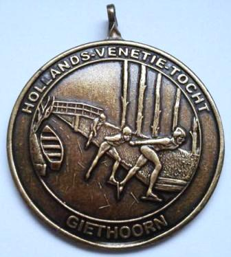 Medaille van de natuurijsklassieker de 'Hollands Venetiëtocht""